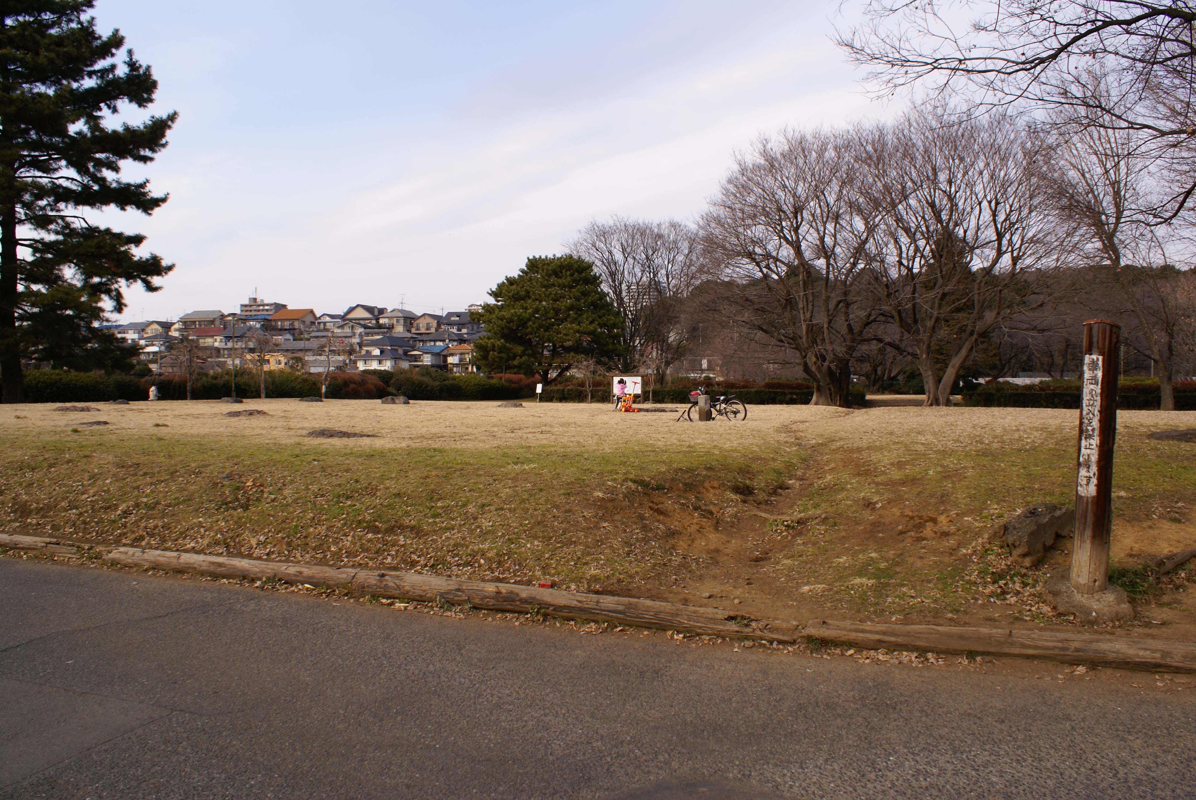 中門跡から見る金堂跡.